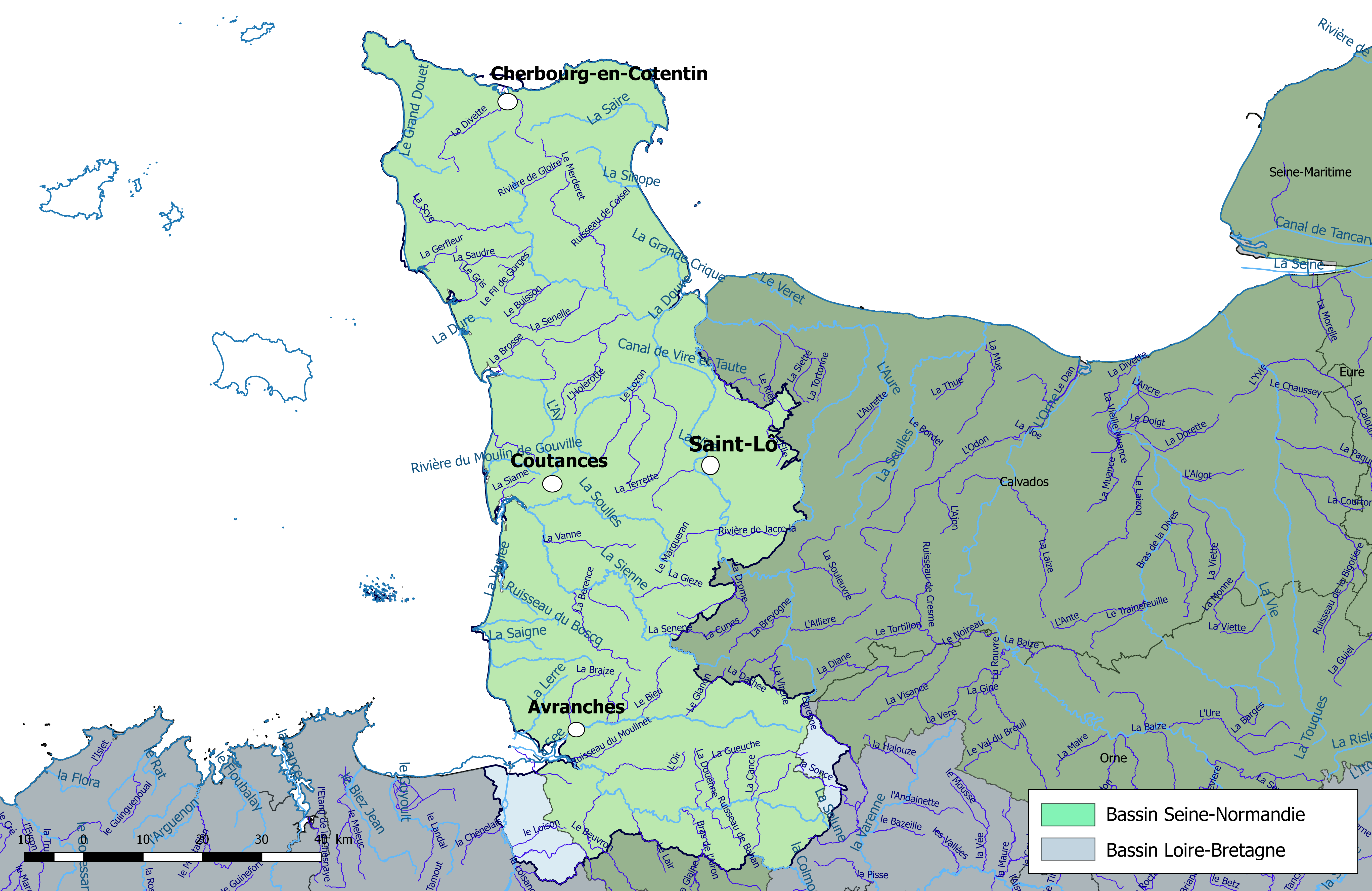 Carte des cours d'eau de longueur supérieure à 10 km et des bassins hydrographiques dans le département de la Manche (France).